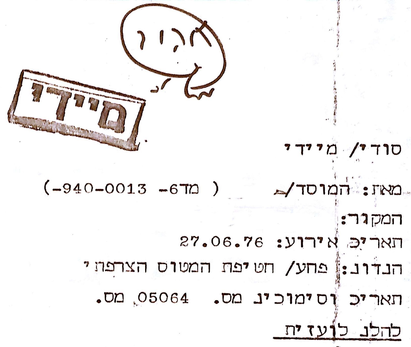 מברק מהמוסד המודיע על חטיפת מטוס